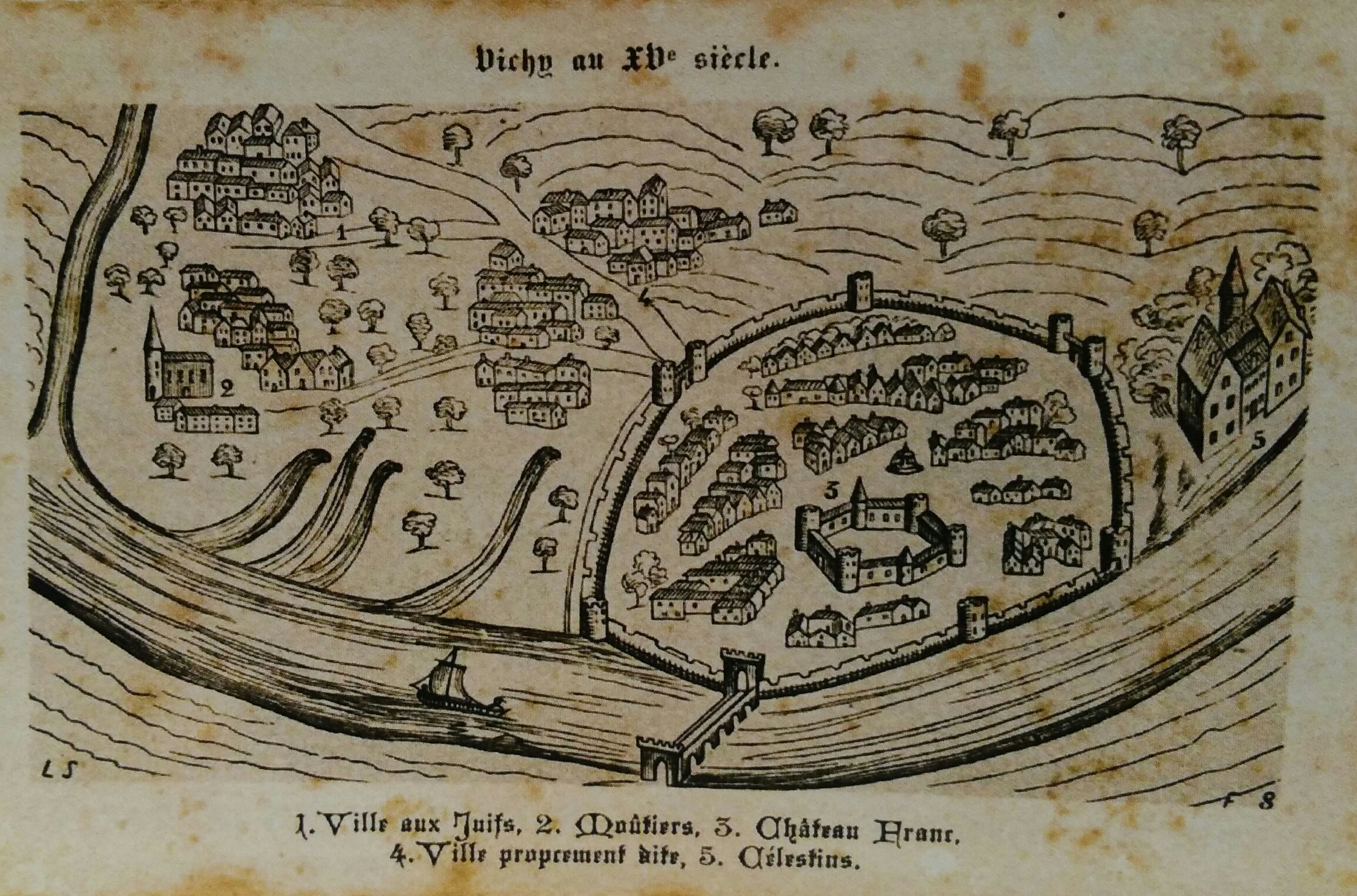 Carte de Vichy au XVE siècle mais non dessinée à cette date. Le pont de Vichy est erronnément dessiné en pierre.